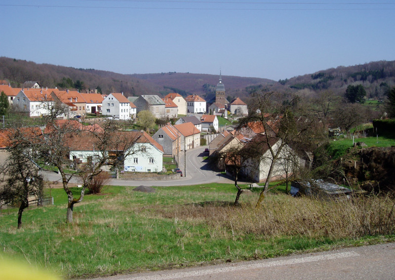 vue de Schorbach